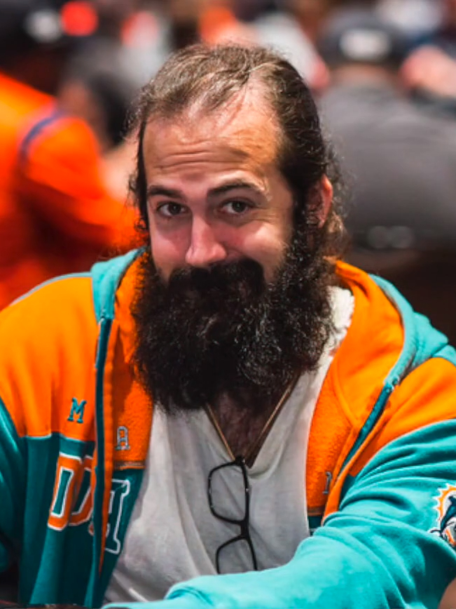 Jason Mercier beim WPT Seminole Hard Rock Poker Showdown